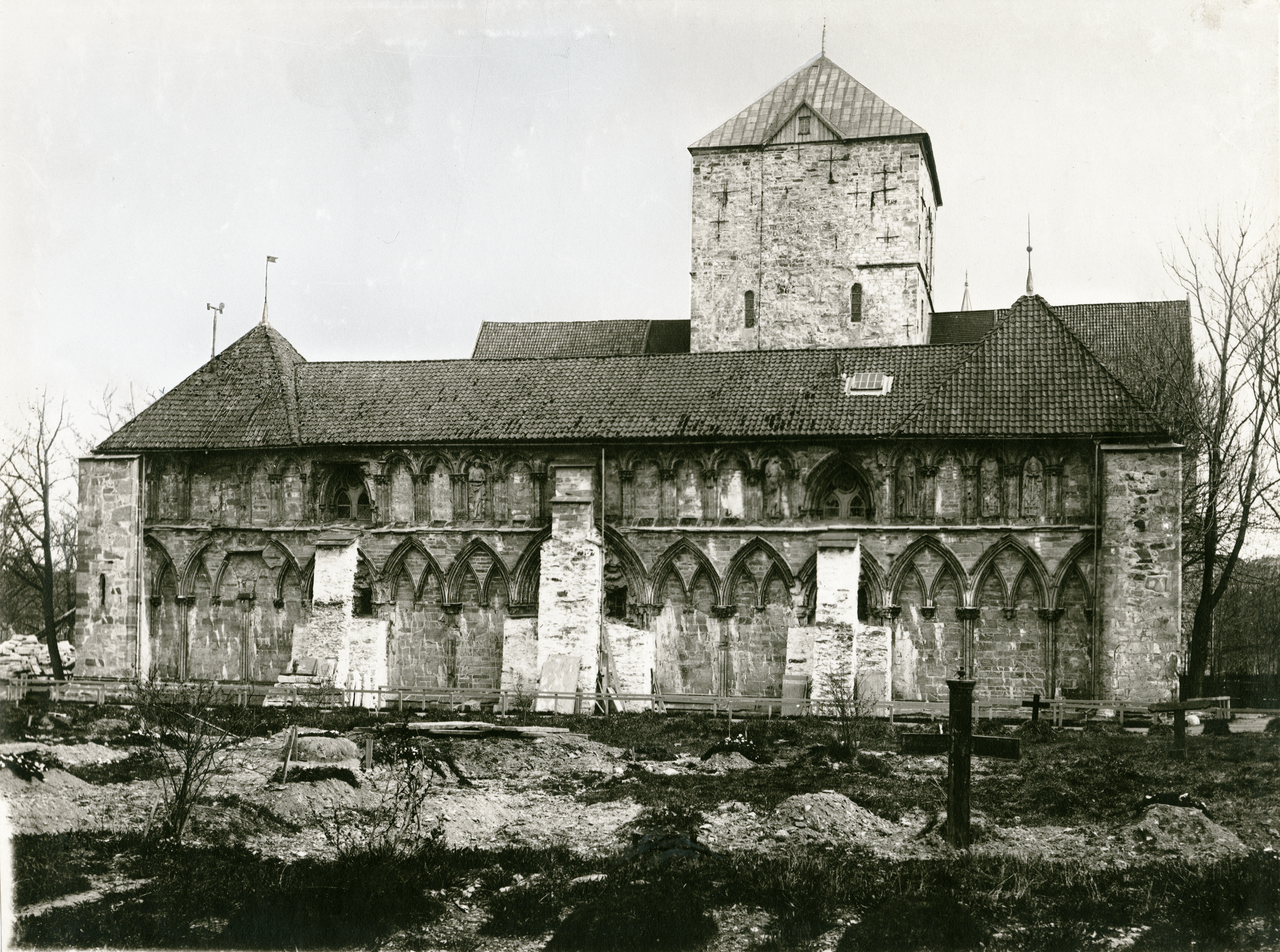 Nidaros domkirke - Nidarosdomen i Trondheim, Sør-Trøndelag